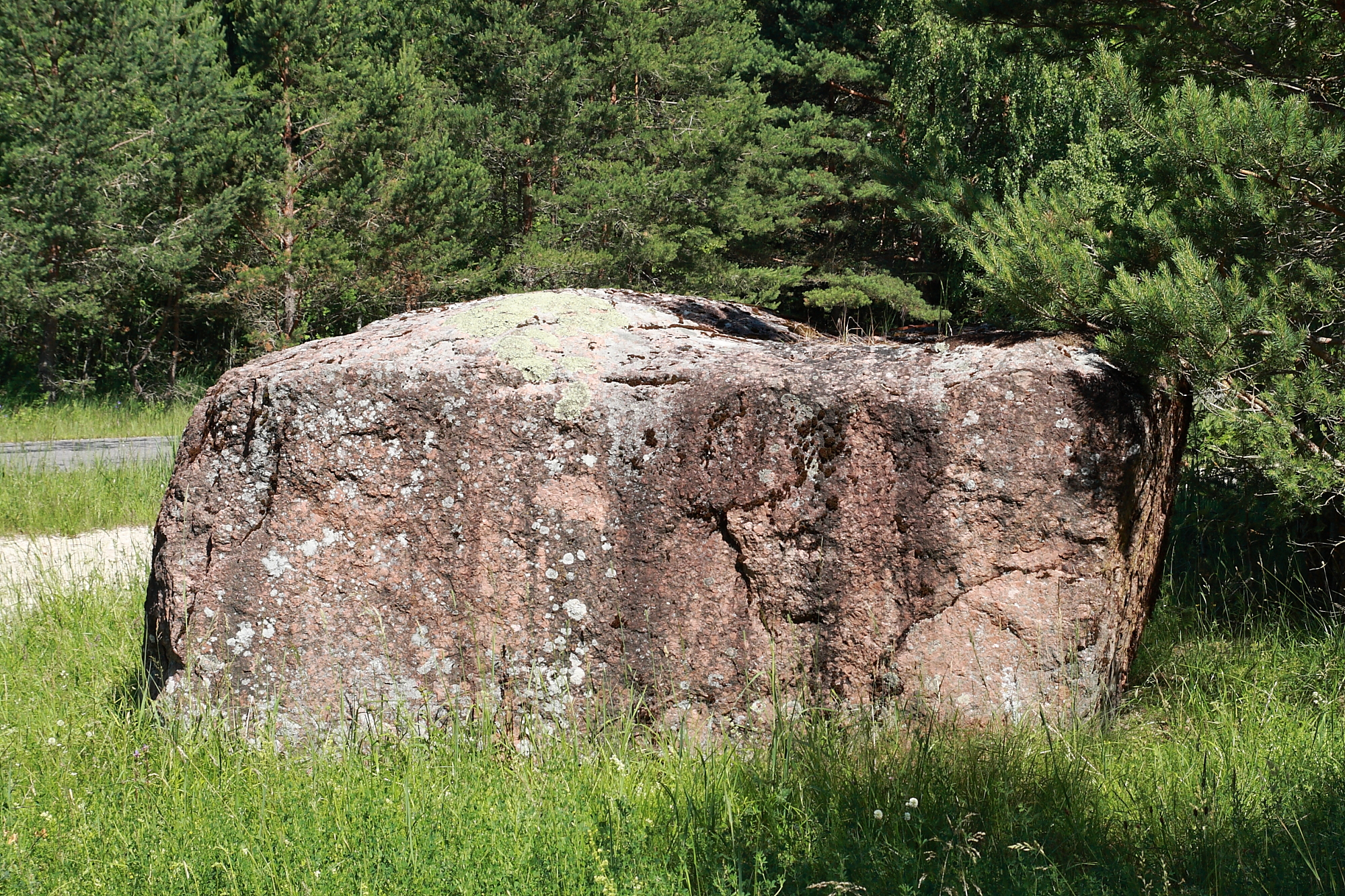 Madise küla ohvrikivi